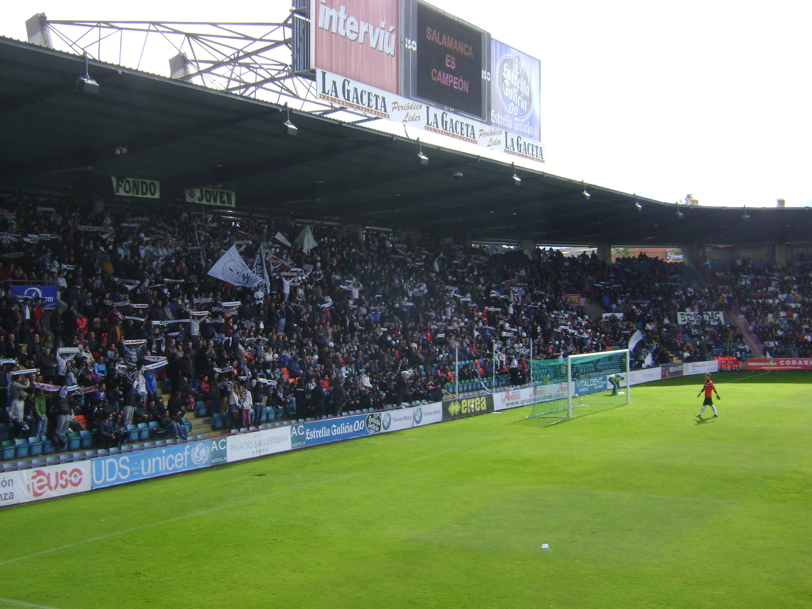 Afición de la UDS, apoyando a su equipo durante un partido en el Helmántico.